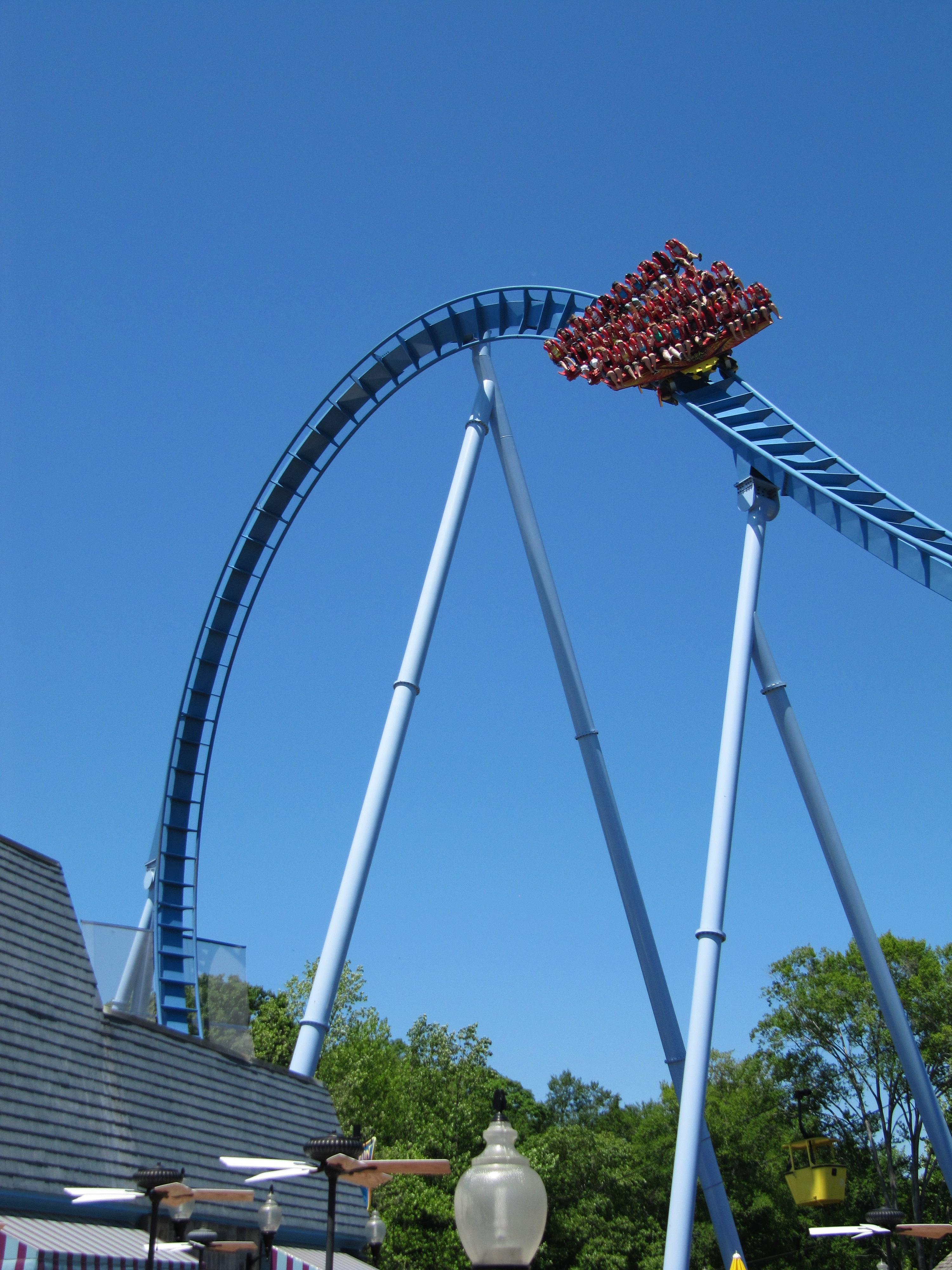 Der erste Immelmann der Achterbahn Griffon in Busch Gardens Williamsburg